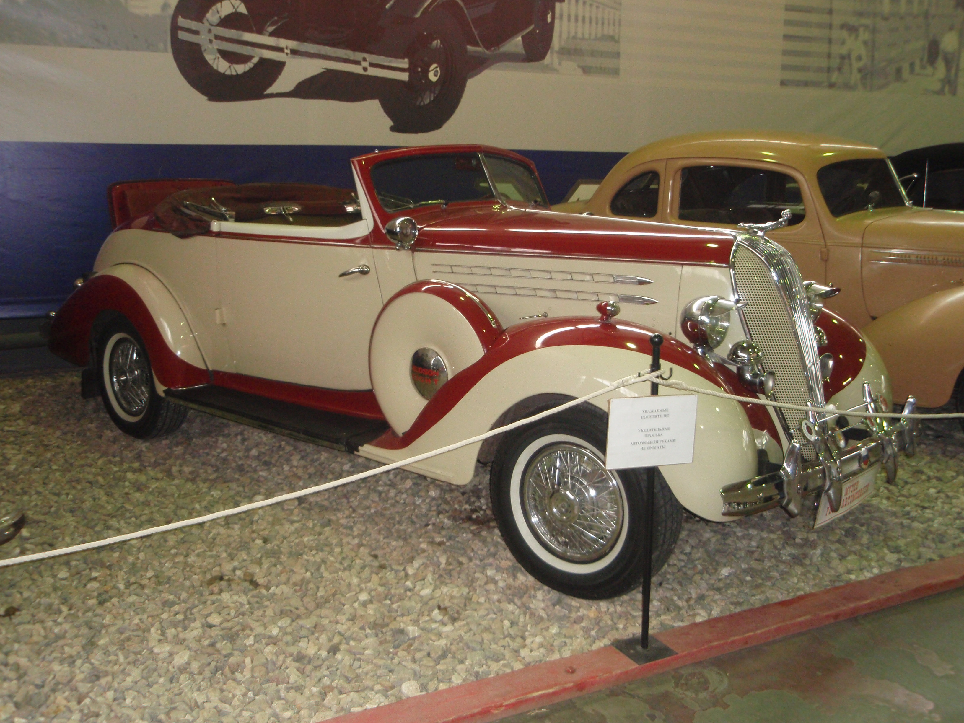 Автомобиль Hudson Eight